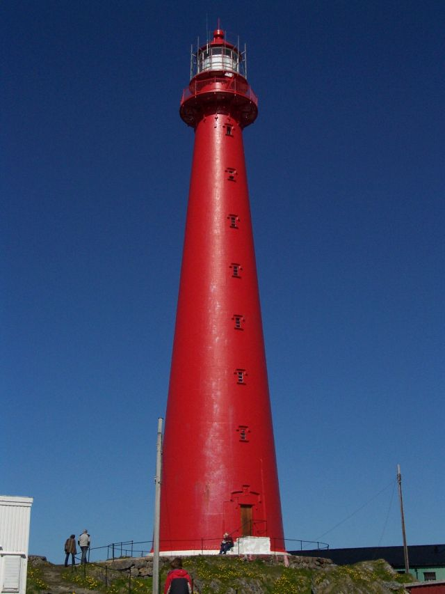 Andenes Leuchtturm, bei schönem Wetter